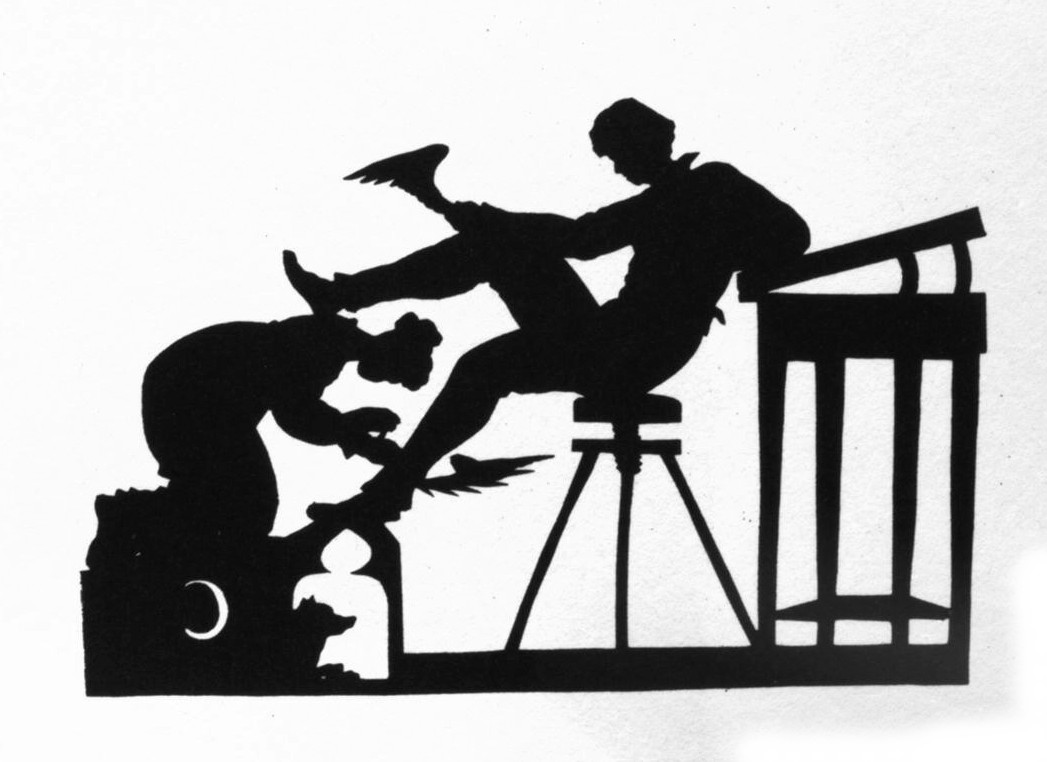 Luise Duttenhofer: Luise Duttenhofer, ihrem Manne Flügel an die Fersen heftend, schwarzer Scherenschnitt, Entstehungsjahr frühestens 1804, Marbach, Deutsches Literaturarchiv, Inventarnummer 5532.